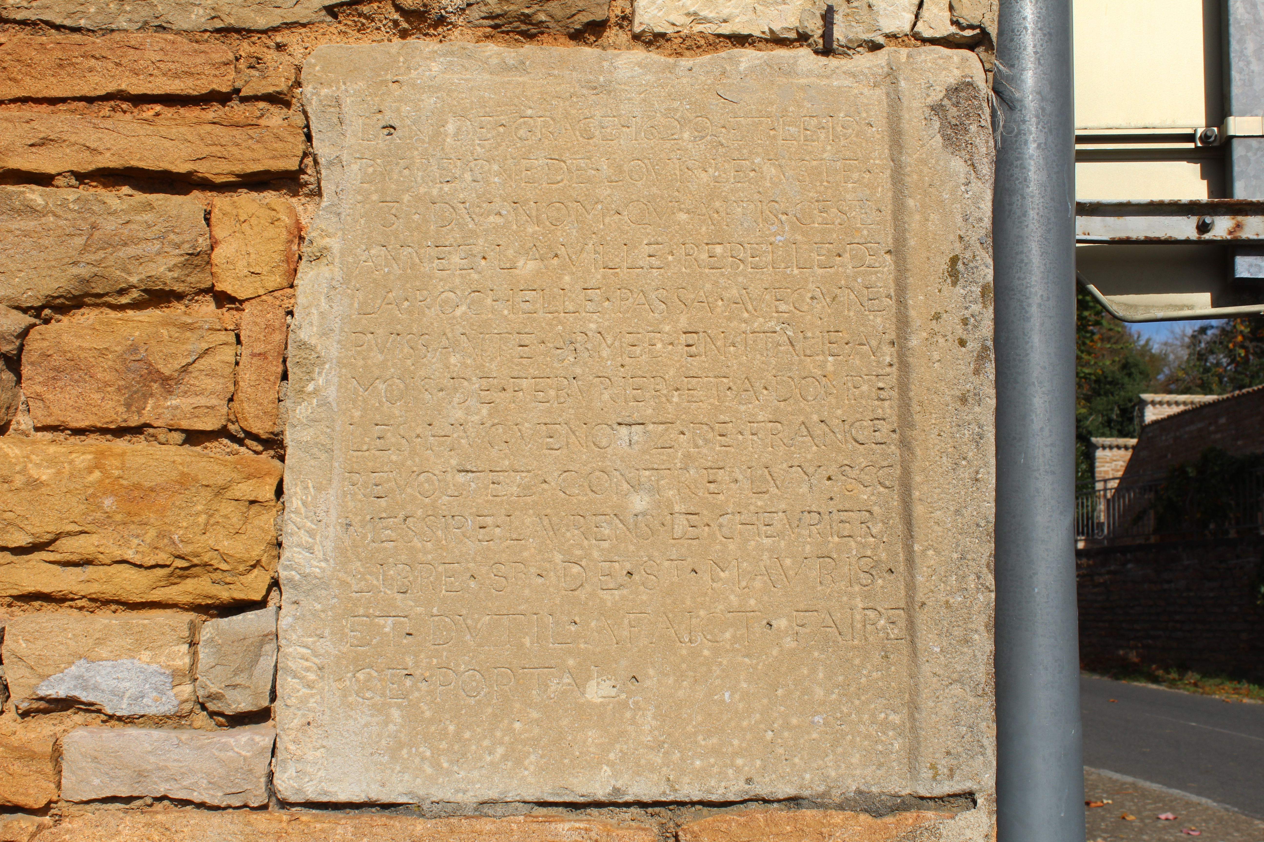 Inscription relatant un fait de 1629 sur un bâtiment à l'intersection entre les routes de Cluny et de Péronne, Saint-Maurice-de-Satonnay.